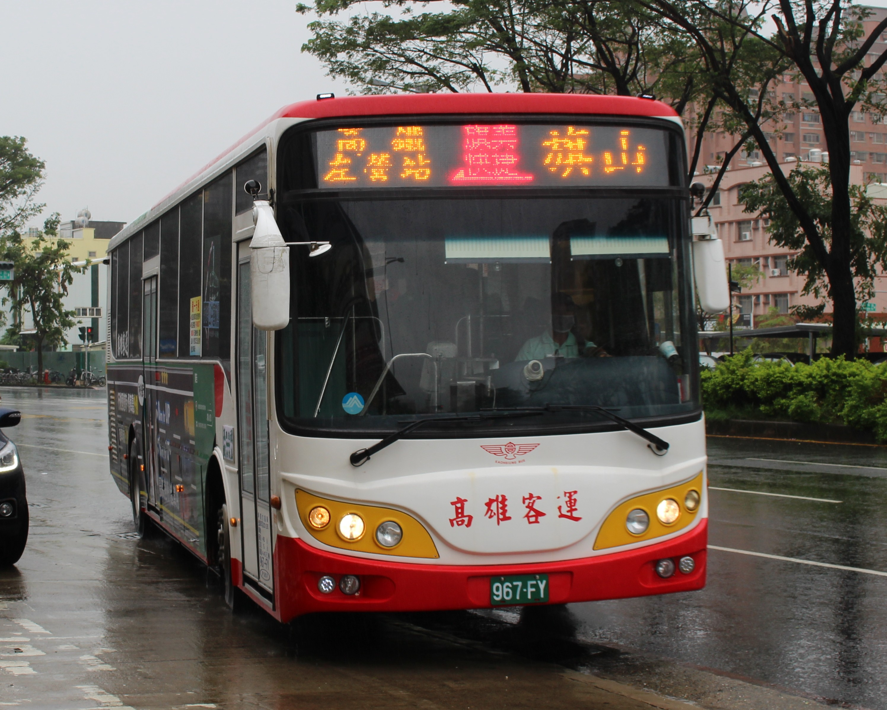 高雄客運2013年FUSO RM11FN1XA市區型大客車967-FY。